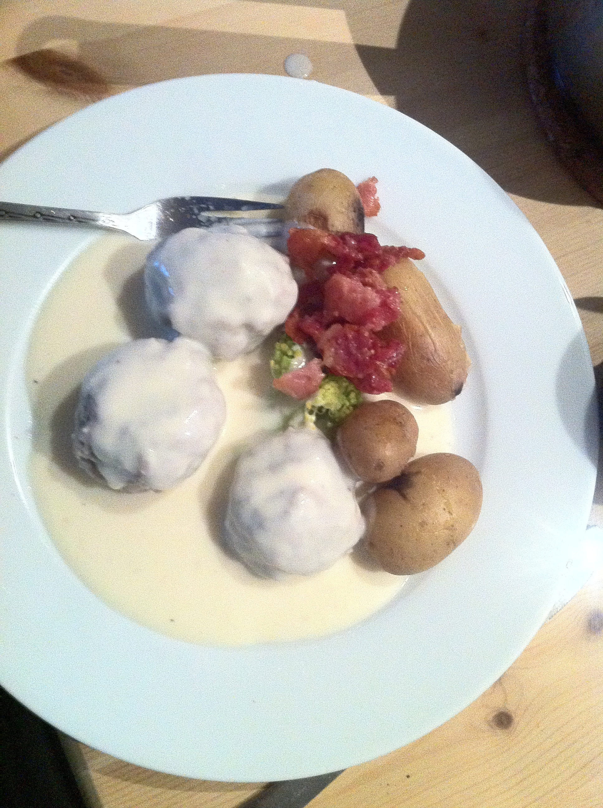 Homemade fiskeboller Fiskeboller mit Sauce.